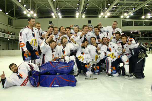 Les Brûleurs de Loups de Grenoble, vainqueurs de la première édition de la Coupe de la Ligue.